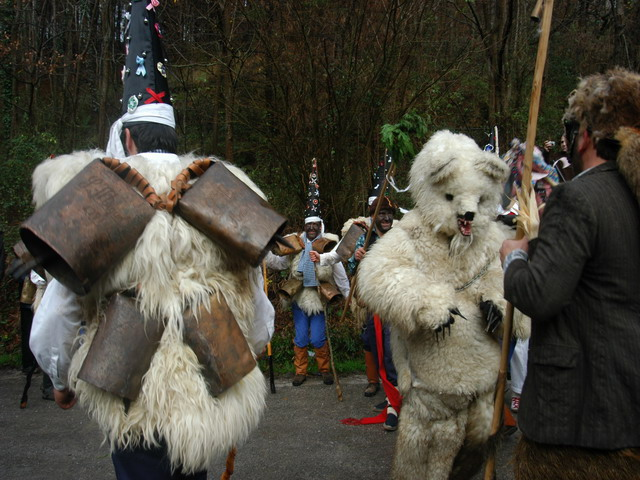 El oso de La Vijanera en Silió © jlgomezlinares